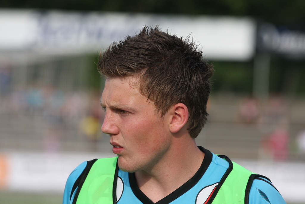 Anders Kristiansen